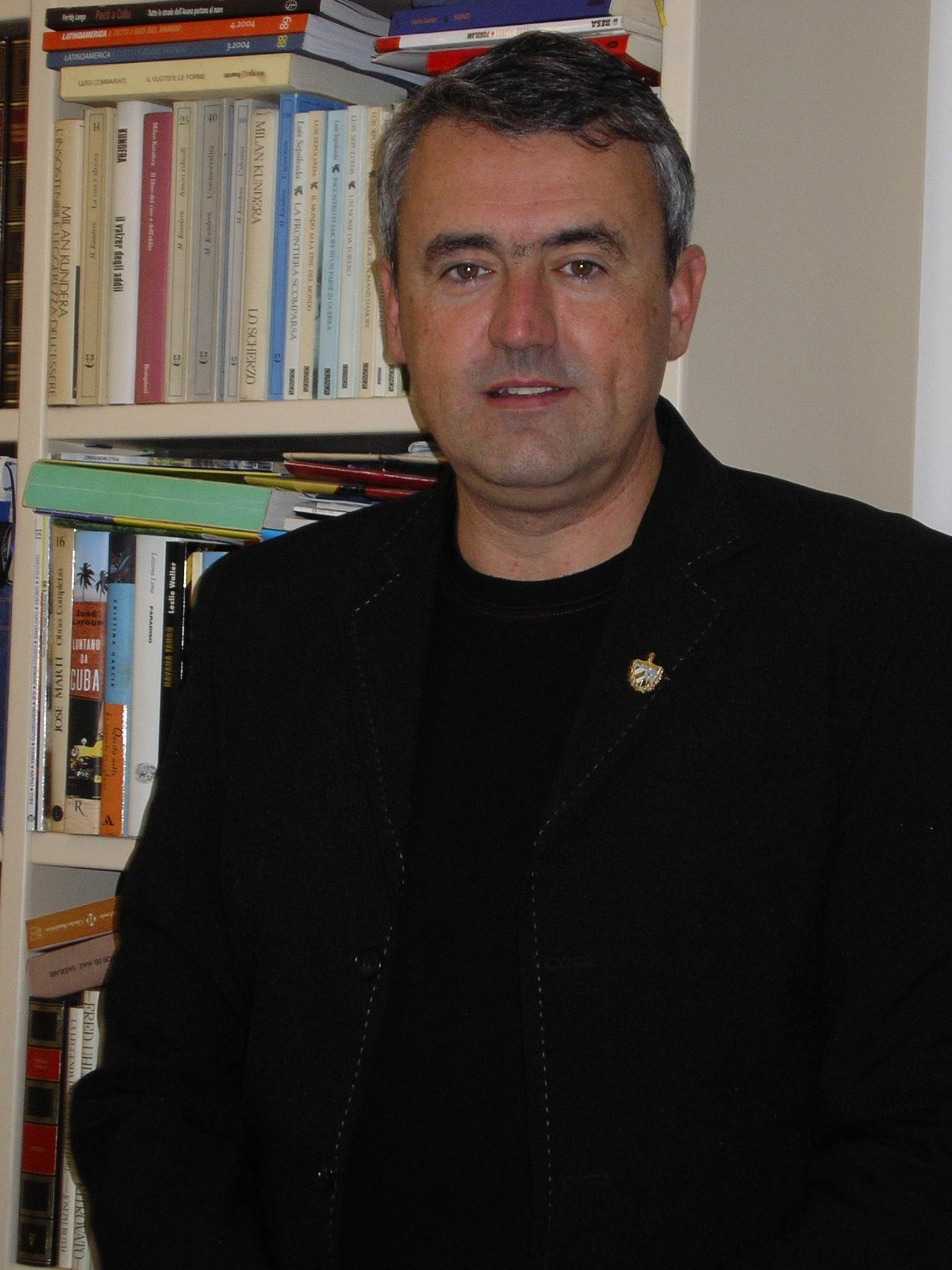 Gordiano Lupi escritor, periodista y traductor italiano. Especializado en cultura cubana y cine italiano